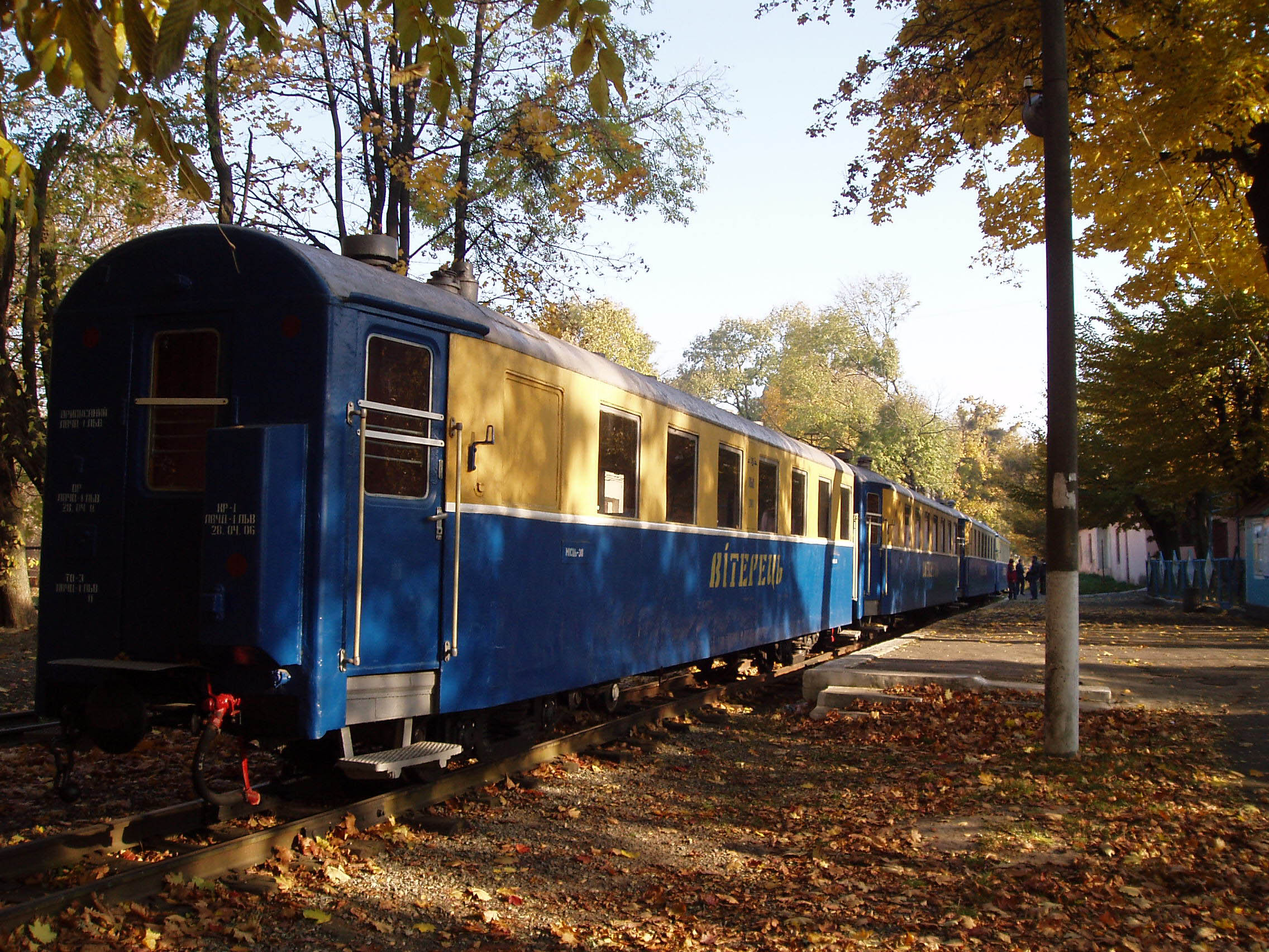 Дитяча залізниця у Стрийському парку у Львові.